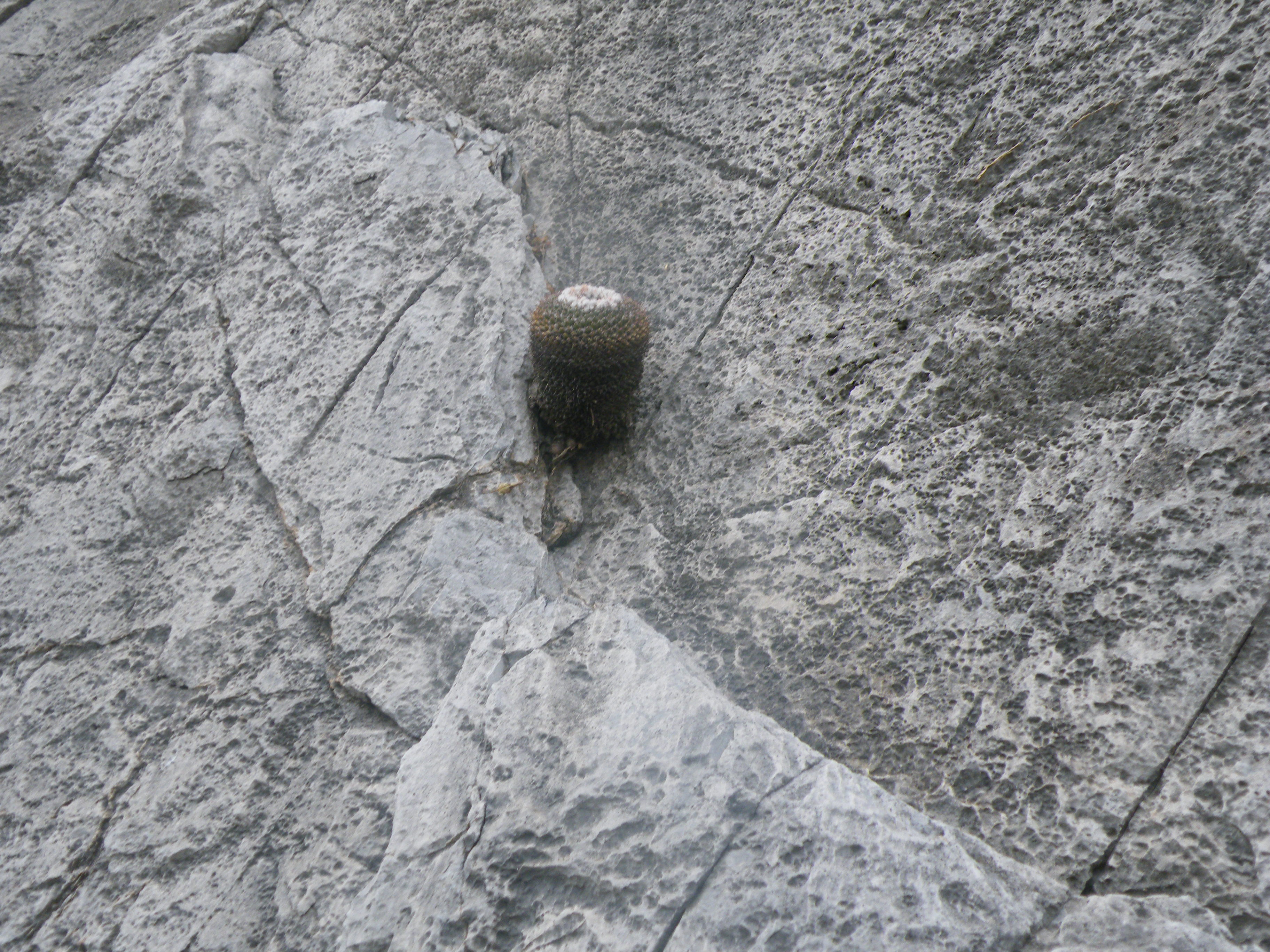 Huasteca Canyon, Nuevo Leon